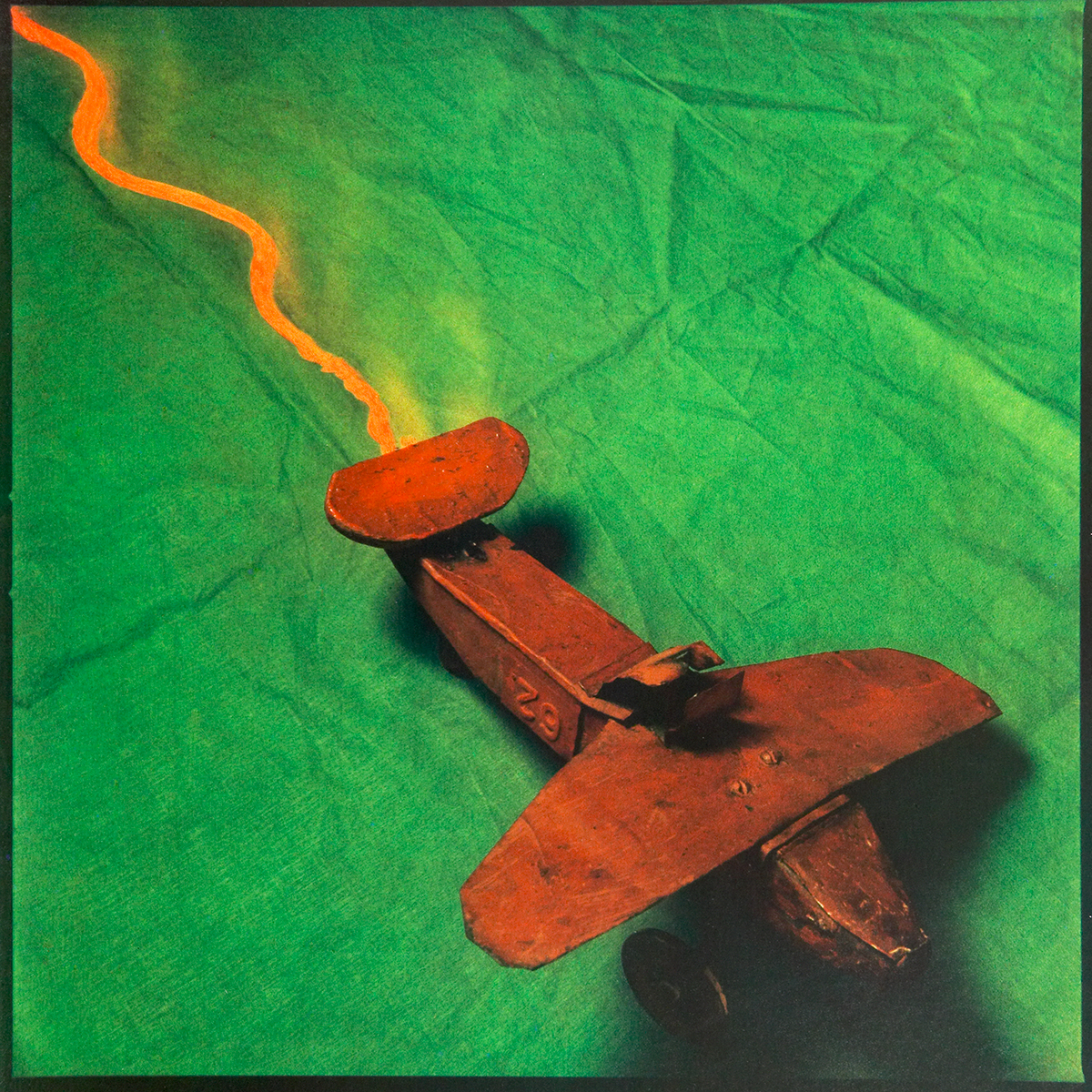 Les jouets #08, 1984, tirage papier Michel Fresson vintage 30 x 30 cm Toys #08, 1984, Michel Fresson print, 12 x 12’’, 30 x 30 cm, vintage print